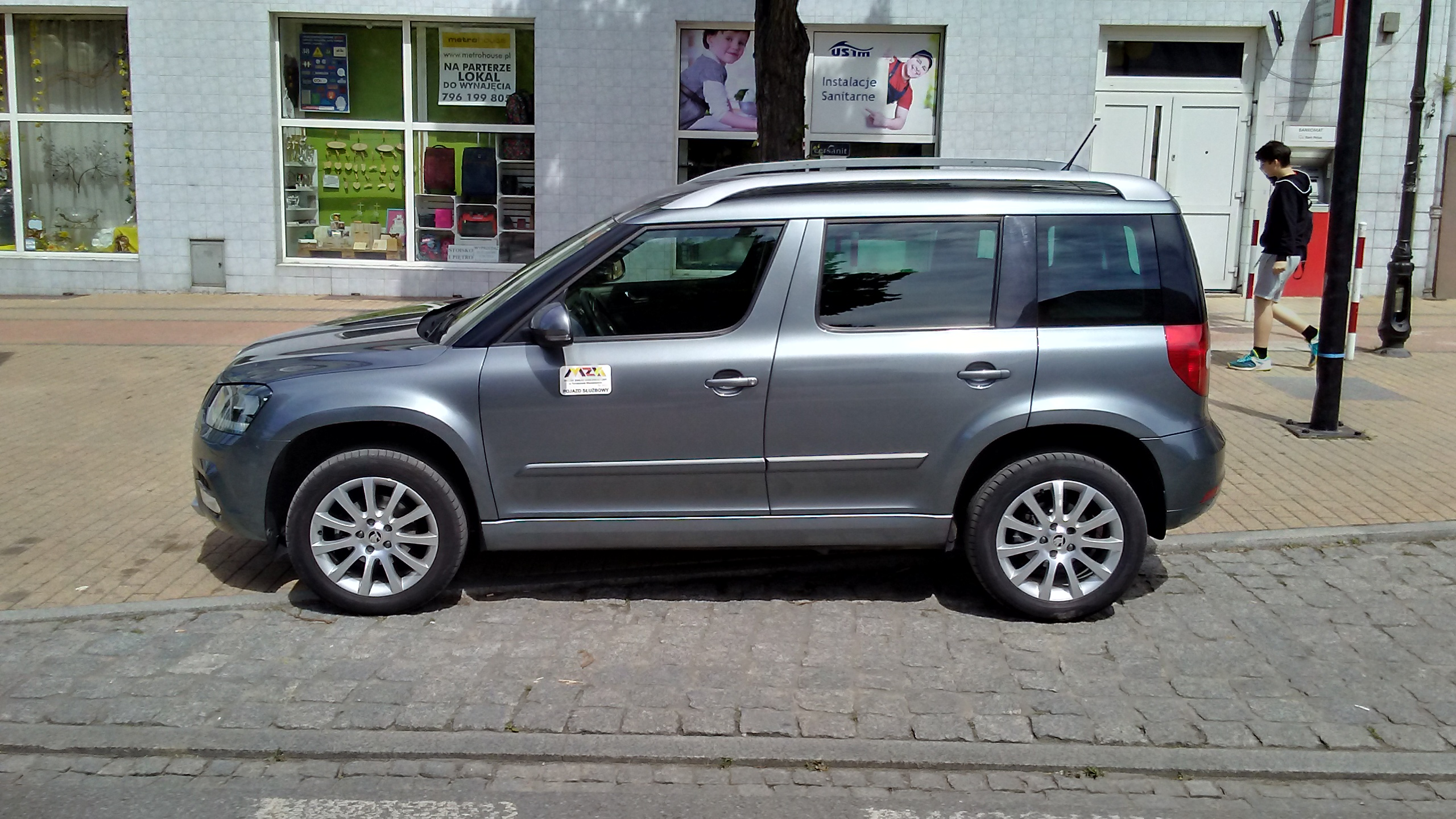 Samochód serwisowy Miejskiego Zakładu Komunikacyjnego w Tomaszowie Mazowieckim, w województwie łódzkim, PL, EU. CC0